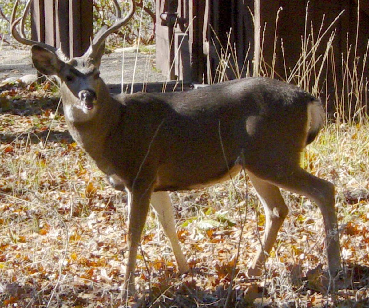 Mule deer near Wawona